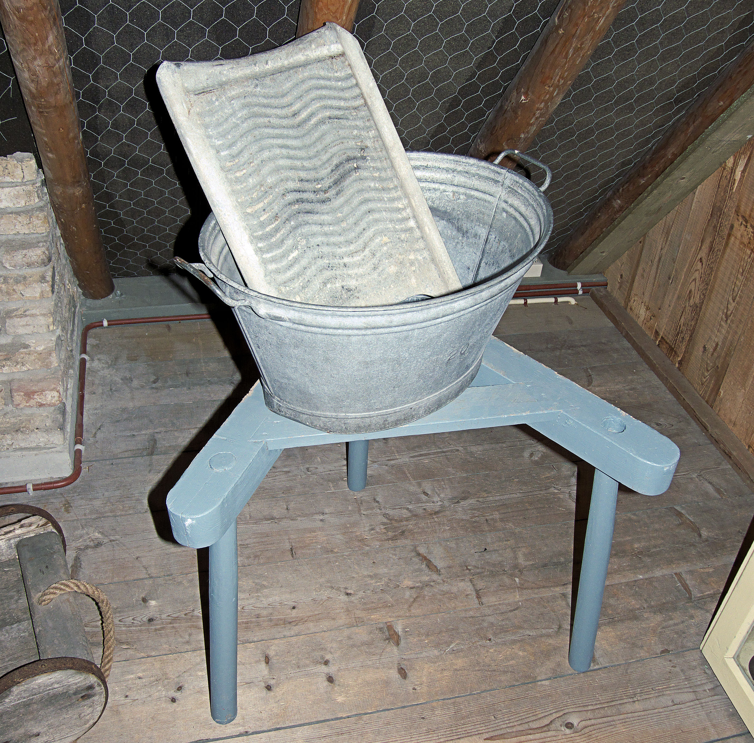 Teil met wasbord